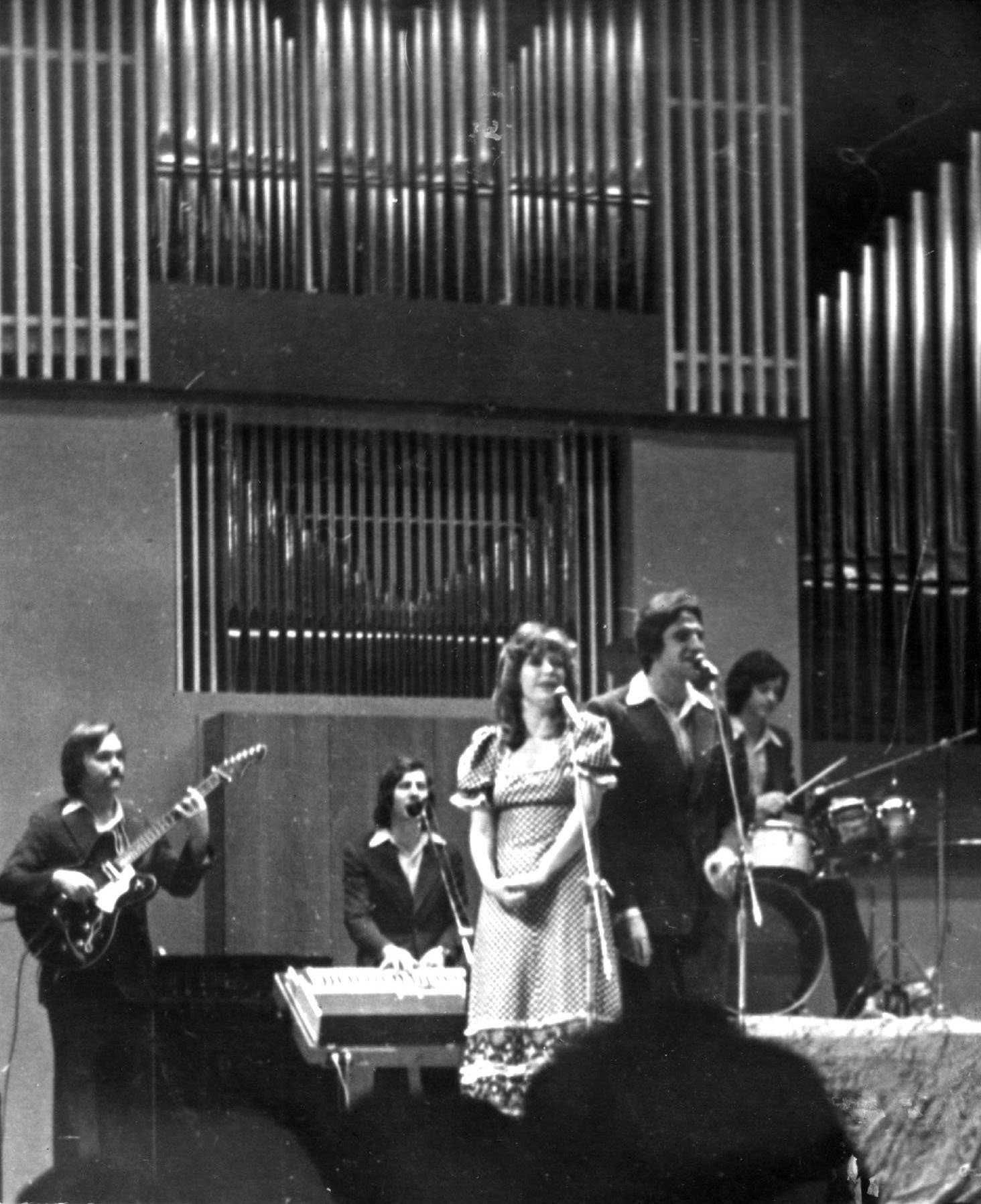 группа "Веселые ребята", Алла Пугачева и Анатолий Алешин, ноябрь 1975 года, г. Ярославль, филармония